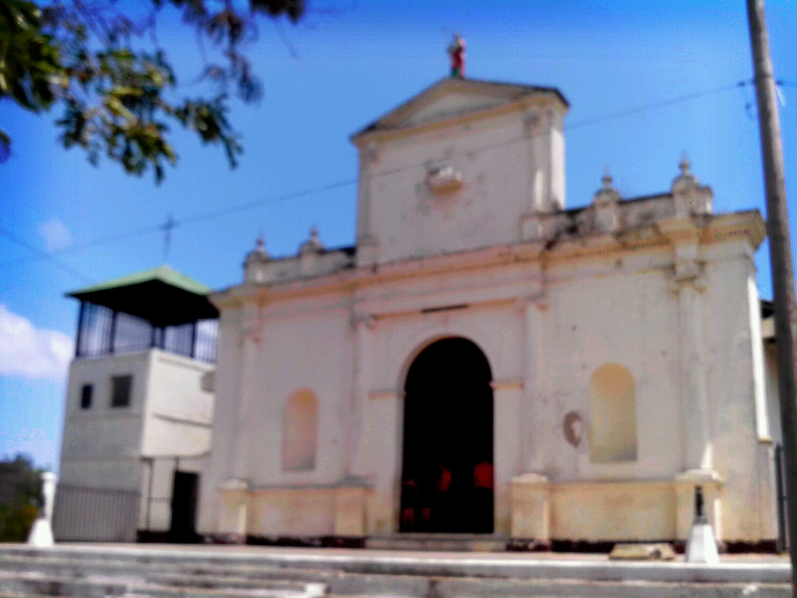 Iglesia San Pedro en Nandasmo, Nicaragua